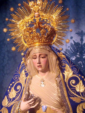 maria santisima de la concepcion coronada de jerez